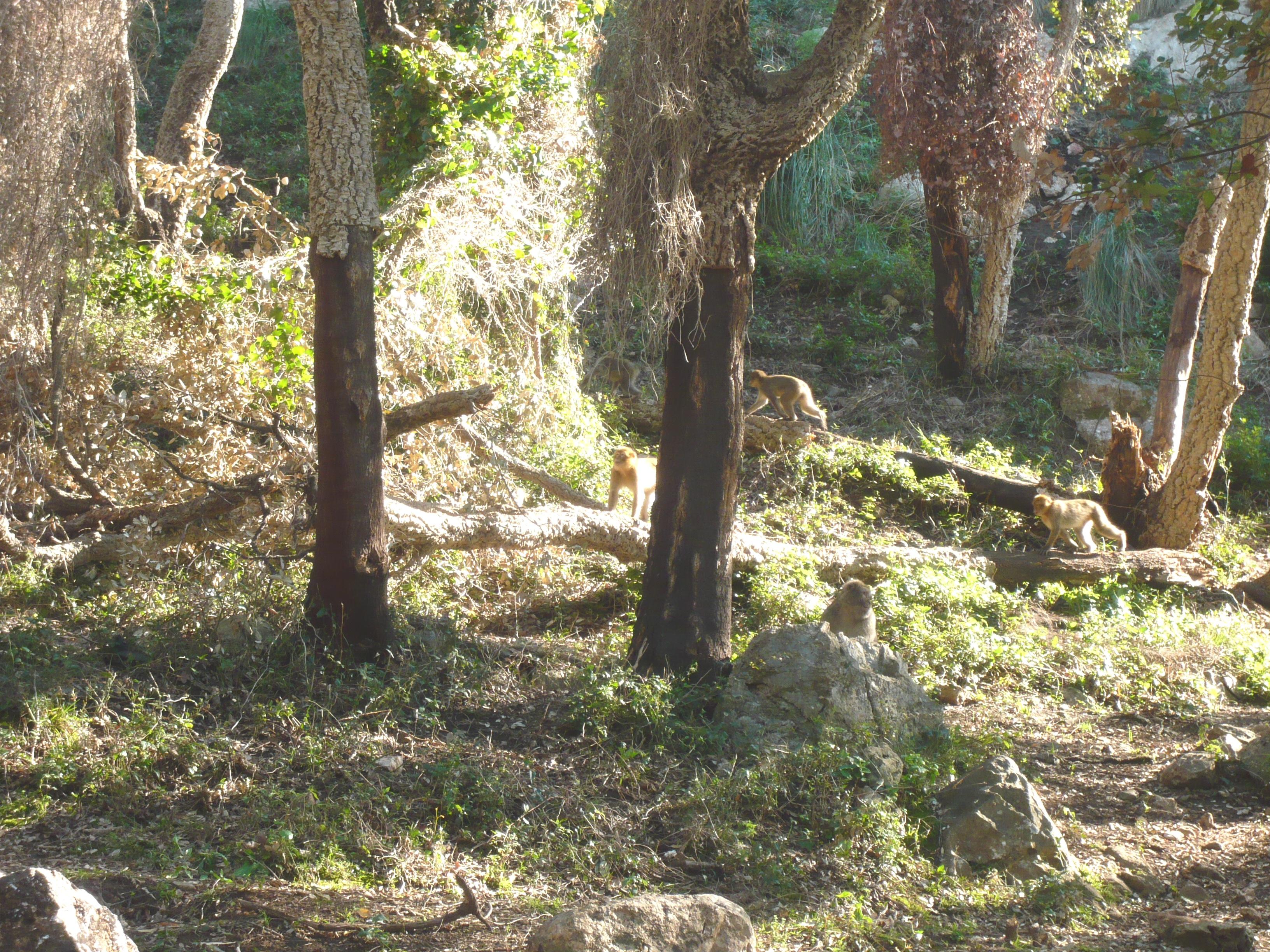 Le Macaque berbère à Tazza, Ziama Mansouriah (Algérie)